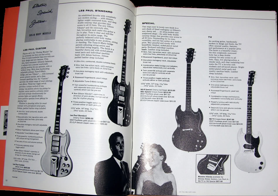 1962ギブソンカタログ